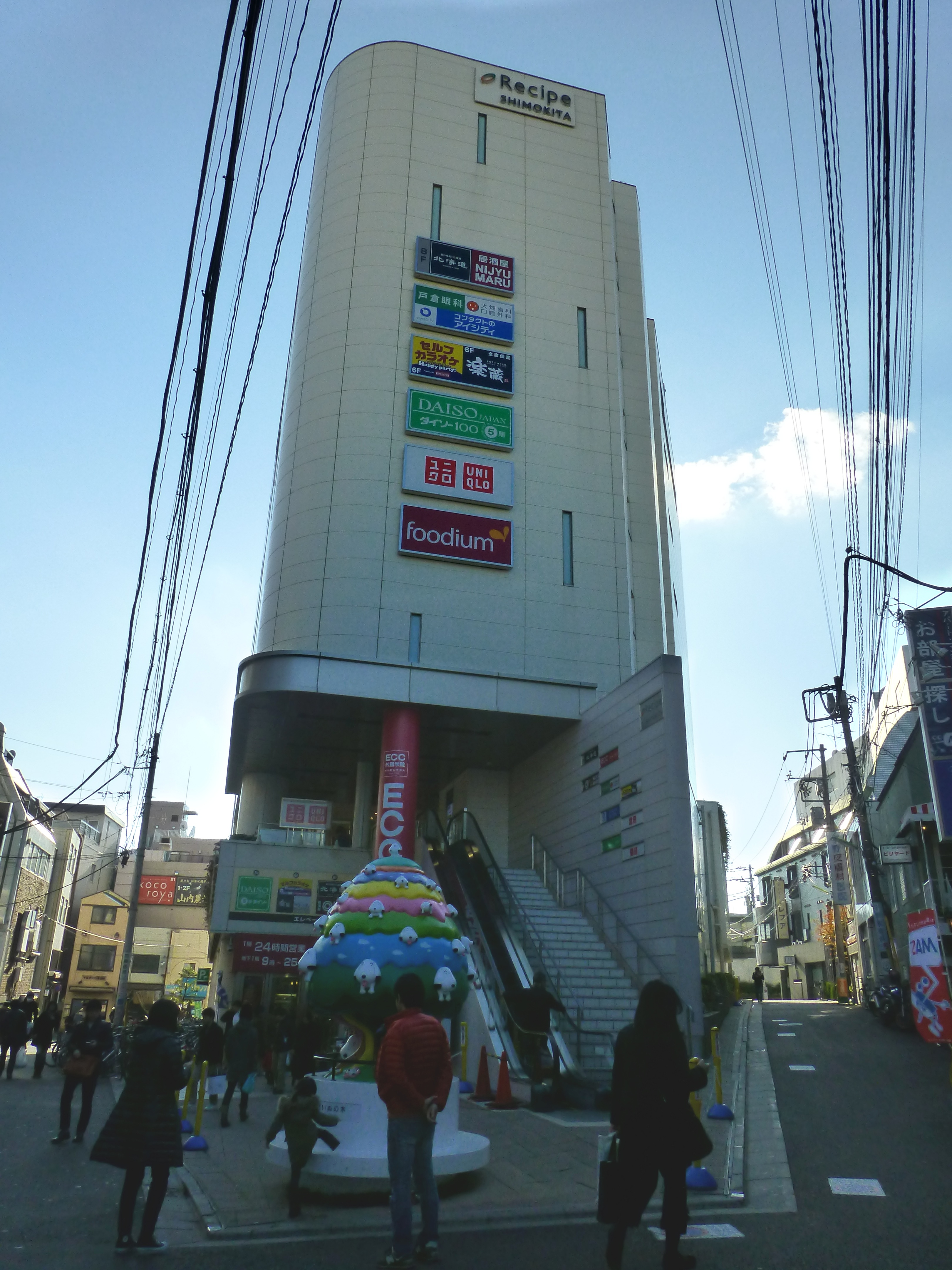 Recipe SHIMOKITA（レシピ シモキタ）は、東京都世田谷区北沢2丁目にある大型商業施設（ショッピングセンター）である。